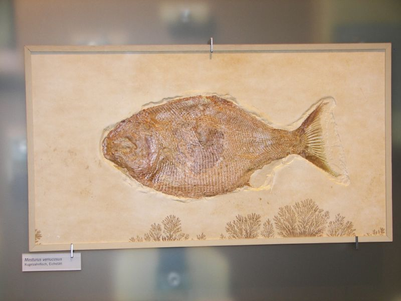 Berlin, Naturkundemuseum.